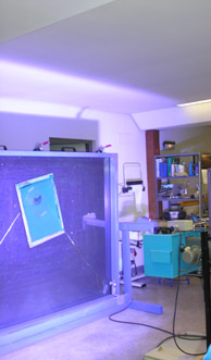 Argia erasotzen